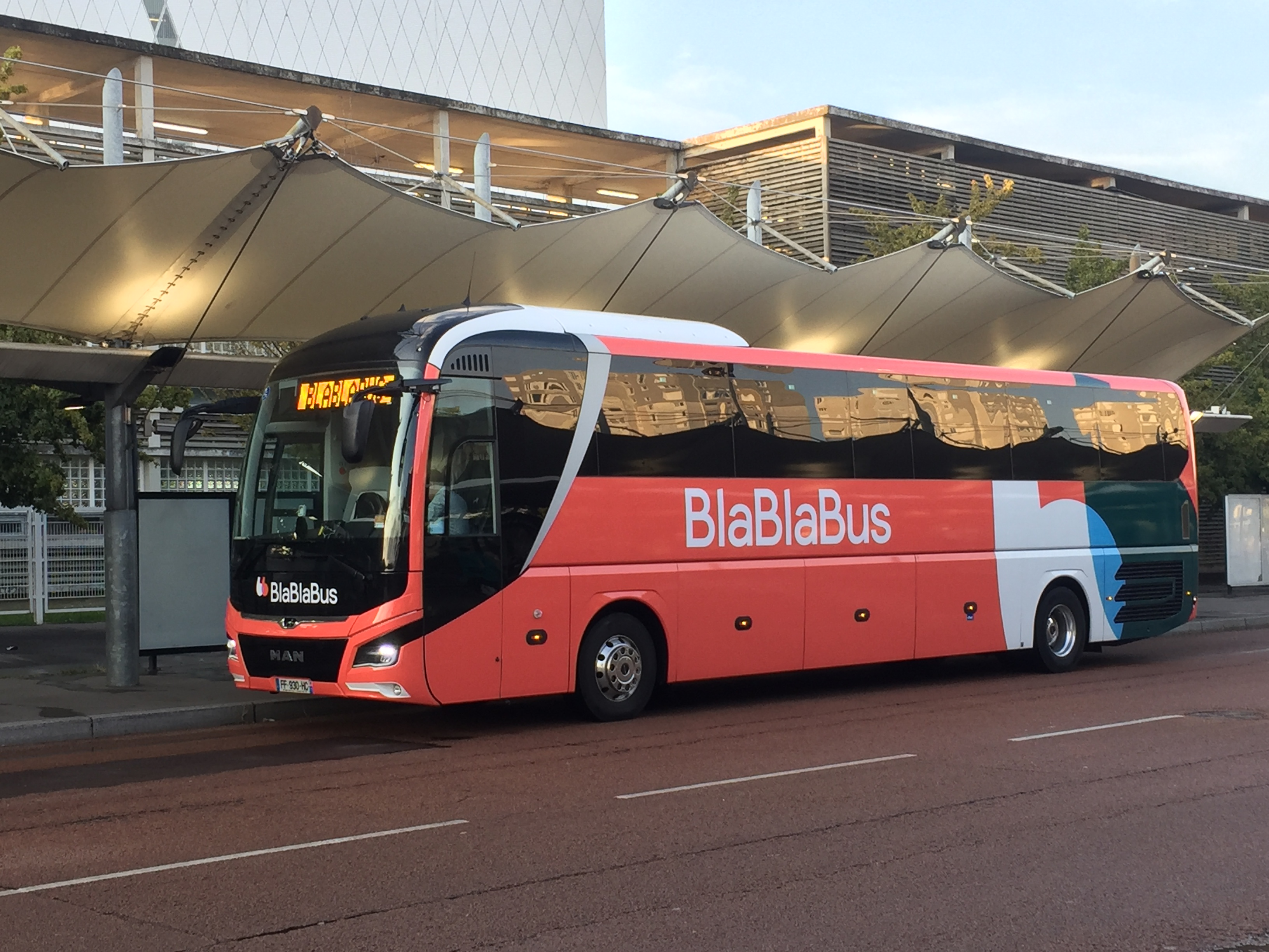 Un bus des lignes BlablaBus à quai à la gare routière de Saint-Denis Université